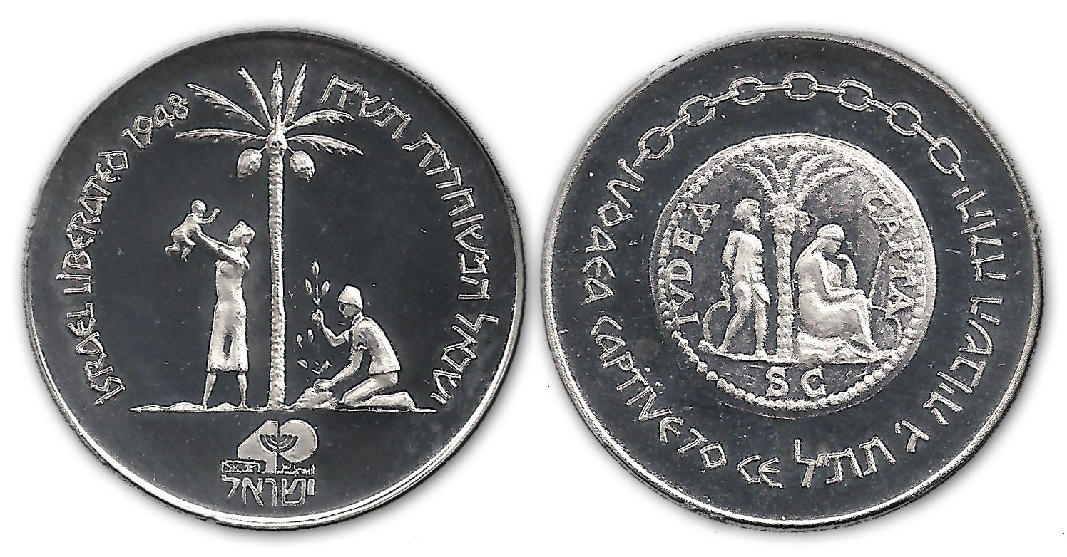 מדליית שחרור דור ב פלטינה